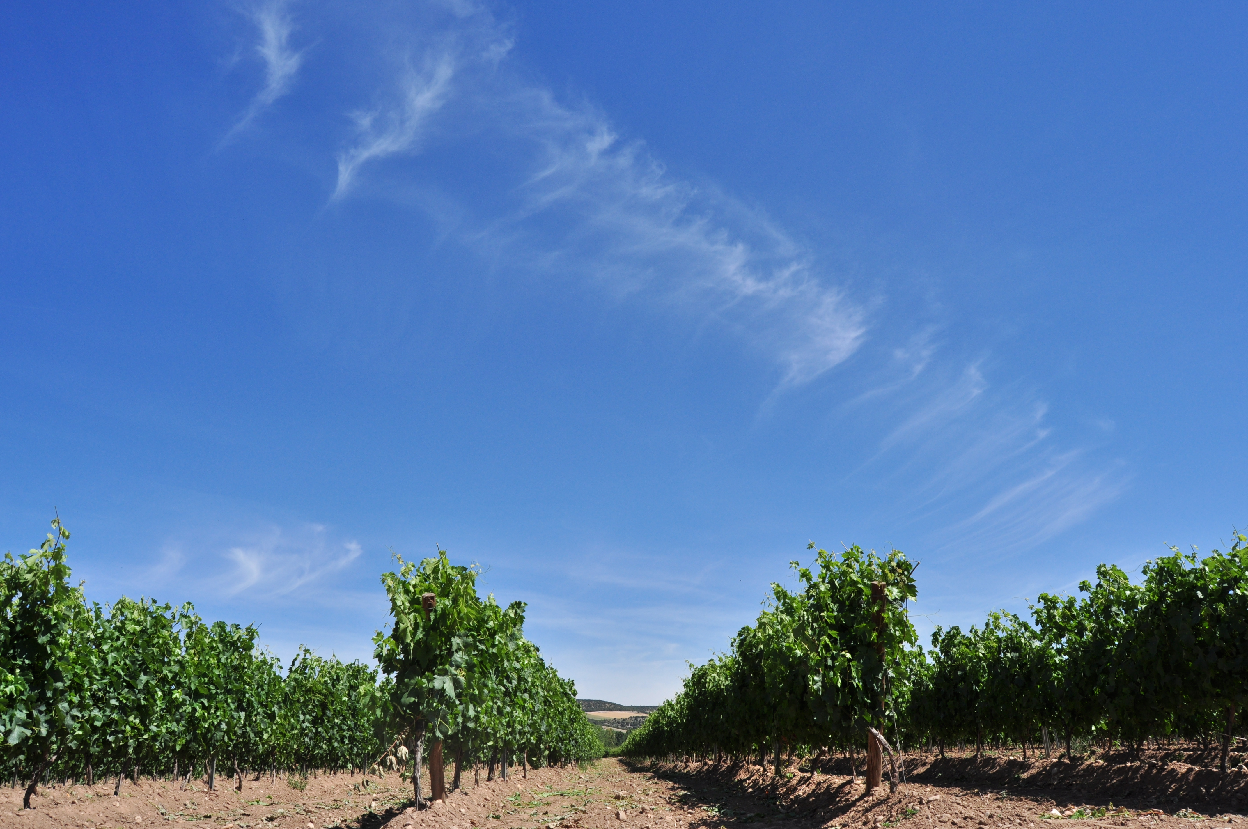 San Bernardo (Valbuena de Duero) - 004